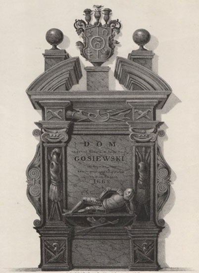 Беларуская (тарашкевіца): Надмагільле Аляксандра Корвін-Гасеўскага (Alaksandar Korvin-Gasieŭski)